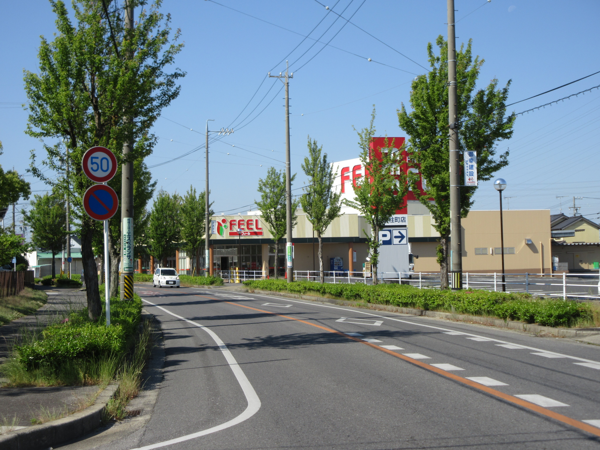 愛知県道43号岡崎碧南線。岡崎市柱4丁目のフィール。